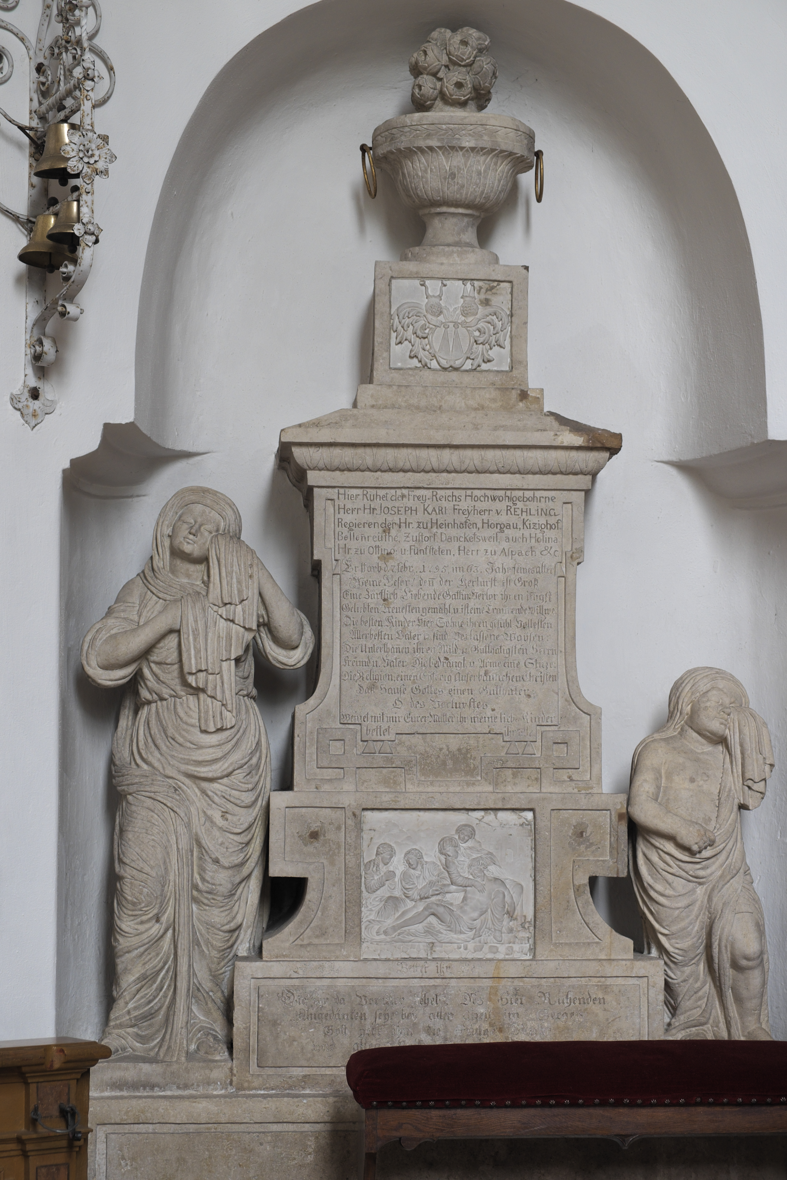 Katholische Pfarrkirche St. Stephanus in Hainhofen, einem Stadtteil von Neusäß im Landkreis Augsburg (Bayern), Epitaph für Joseph Karl Freiherr von Rehling